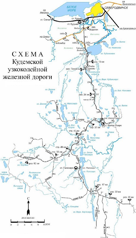 Схема Кудемской УЖД во времена работы леспромхоза